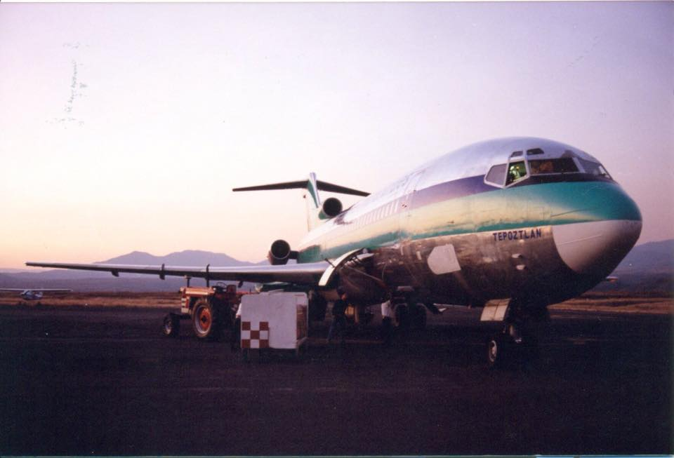 Aerolineas Internacionales Boeing 727-23